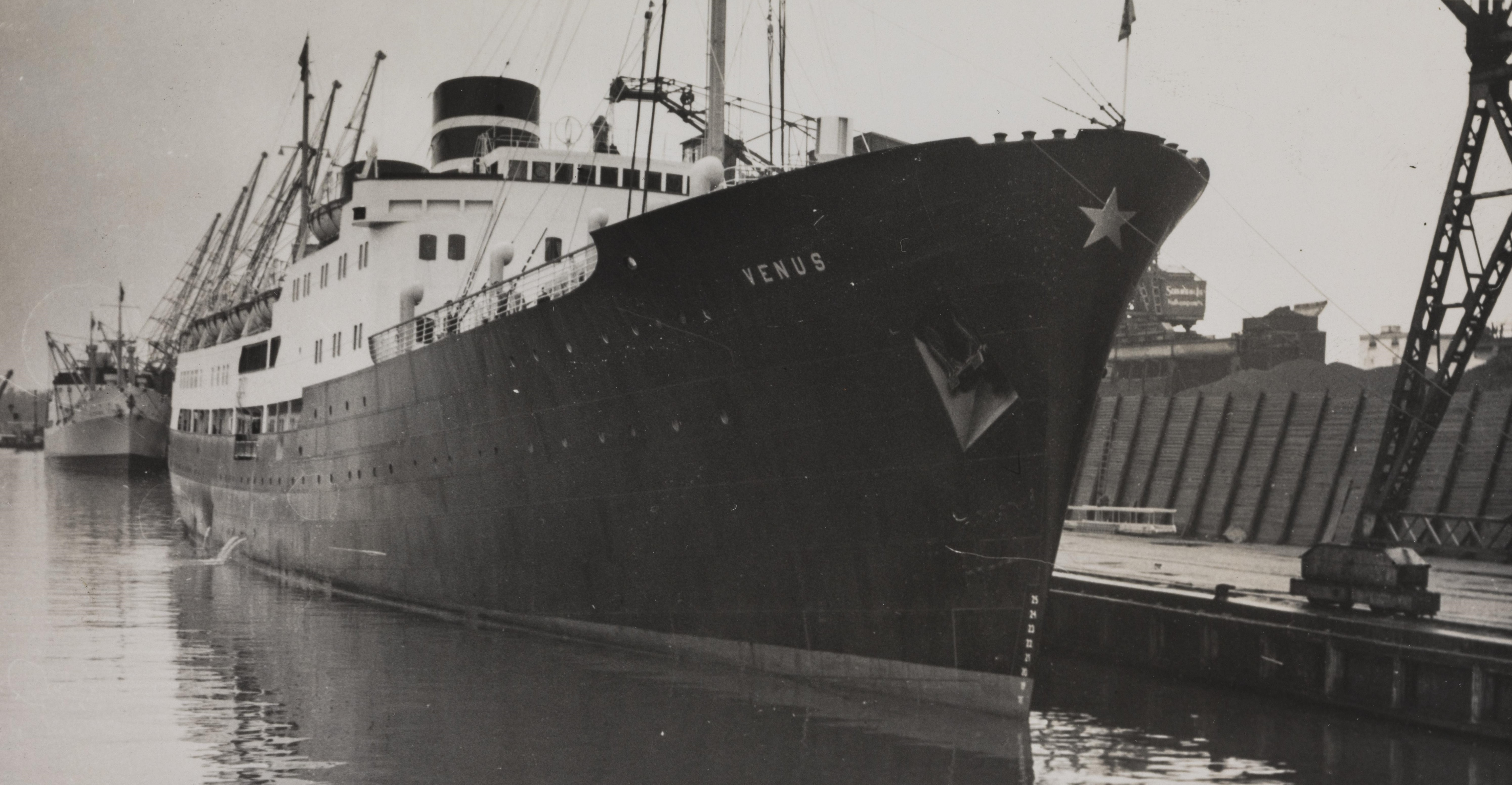 Bildet er hentet fra Nasjonalbibliotekets bildesamling. Anmerkninger til bildet var: Tilhørte Det Bergenske Dampskibselskap